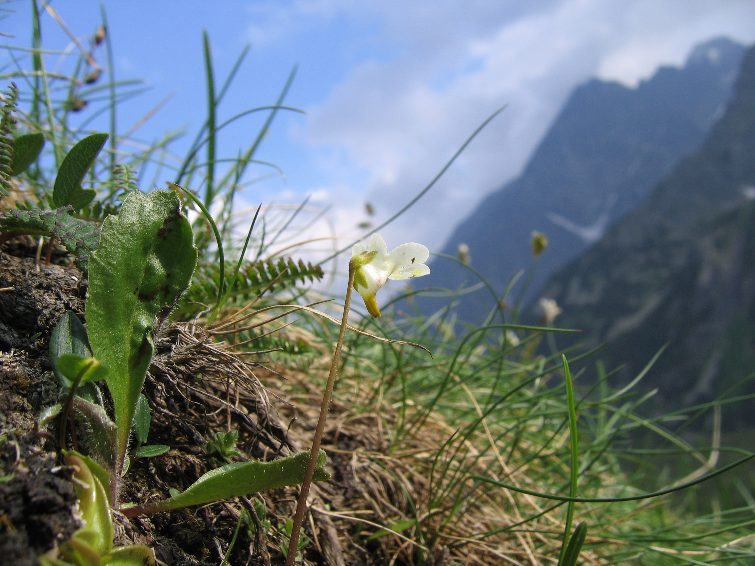 Pinguicula alpina - taken in Tatra Mountains, slovakia near "Chata pri Zelenom plese"